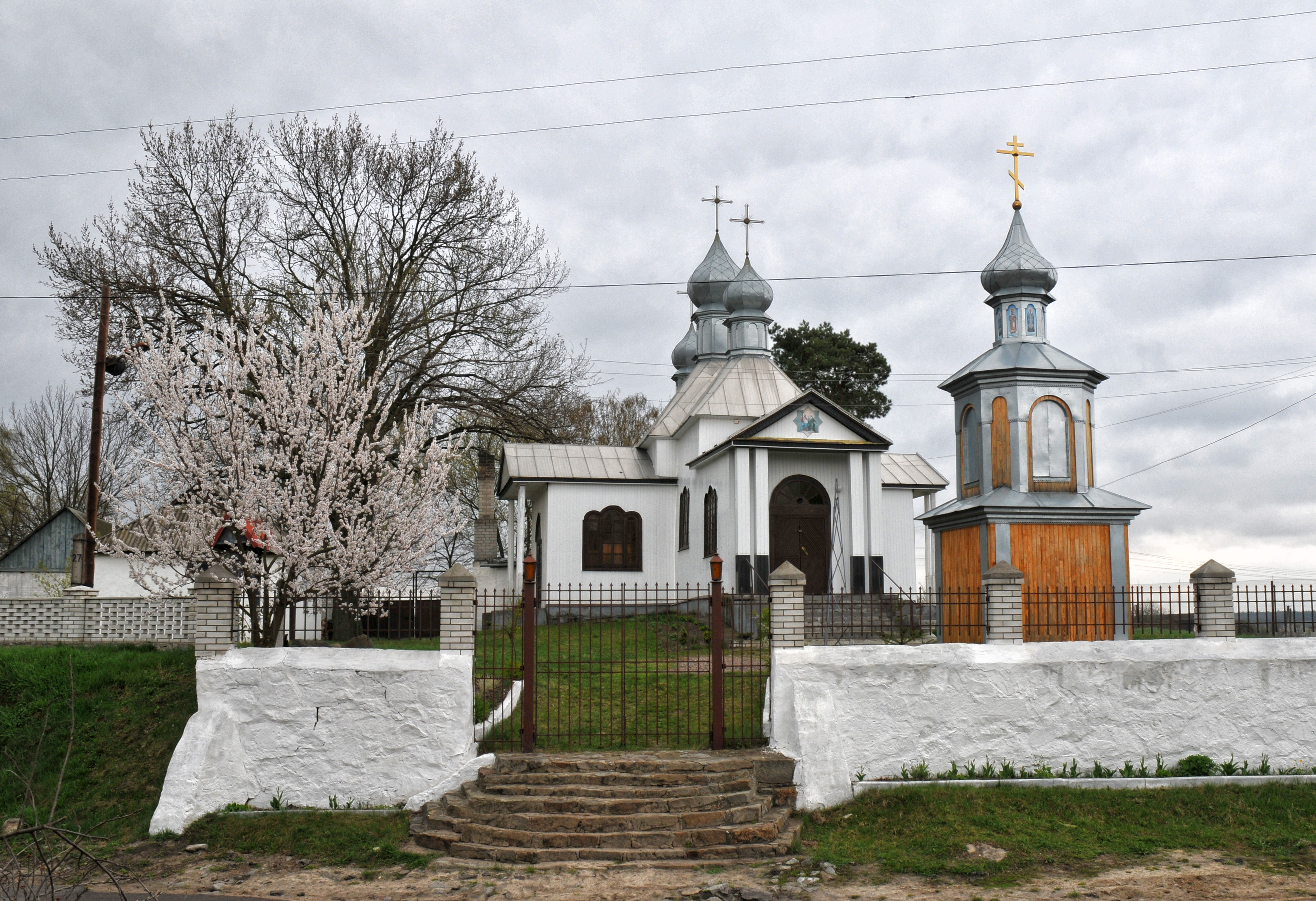 Бушеве, Троїцька церква